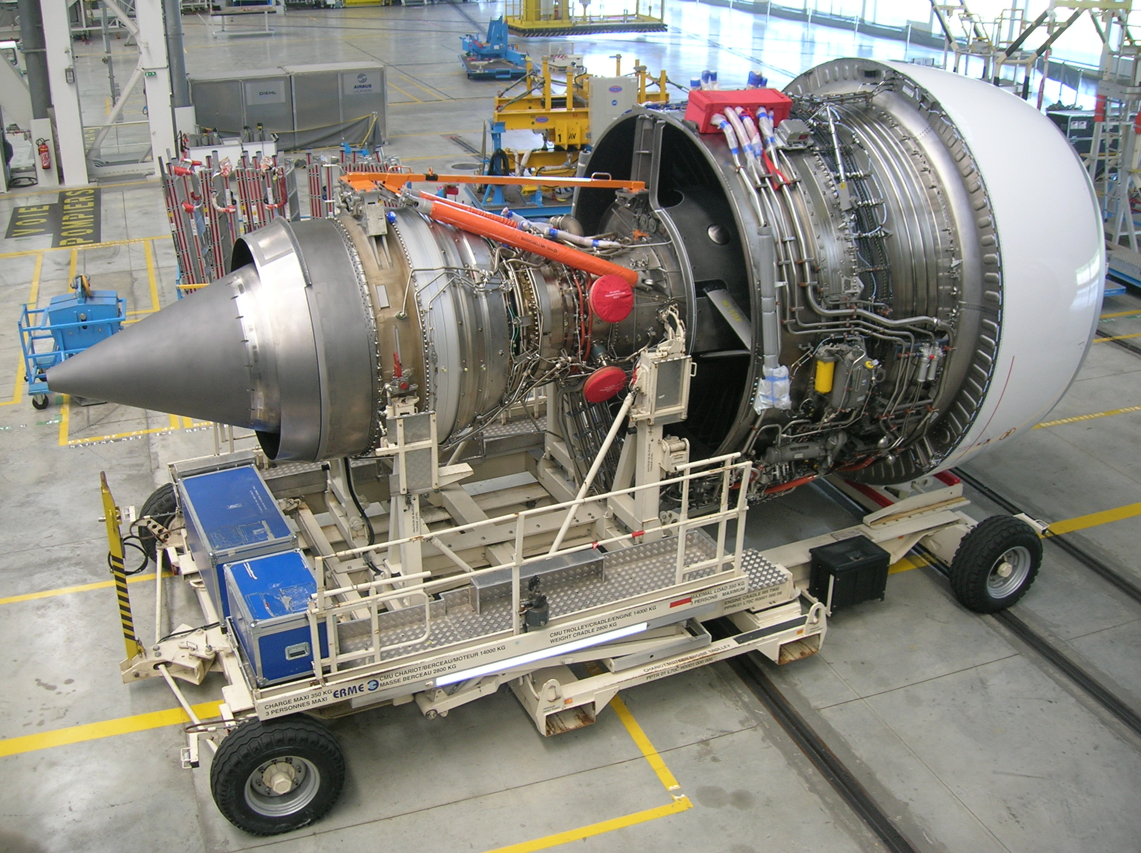 Airbus Lagardère - Trent 900 engine MSN100